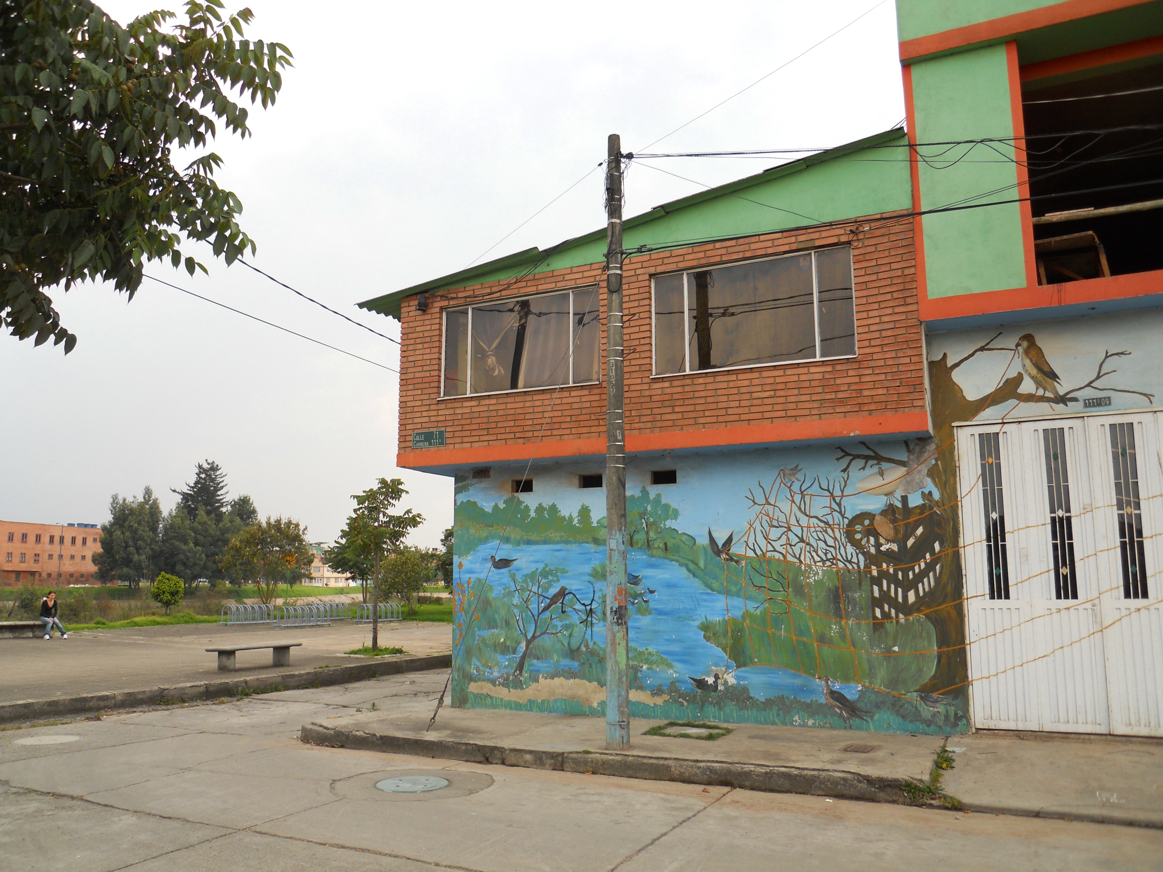 Localidad de Engativá, hacia la carrera 111 a con calle 71, al occidente de Bogotá. Barrio la Riviera. A la izquierda de la imagen se encuentra el humedal de El Jaboque.